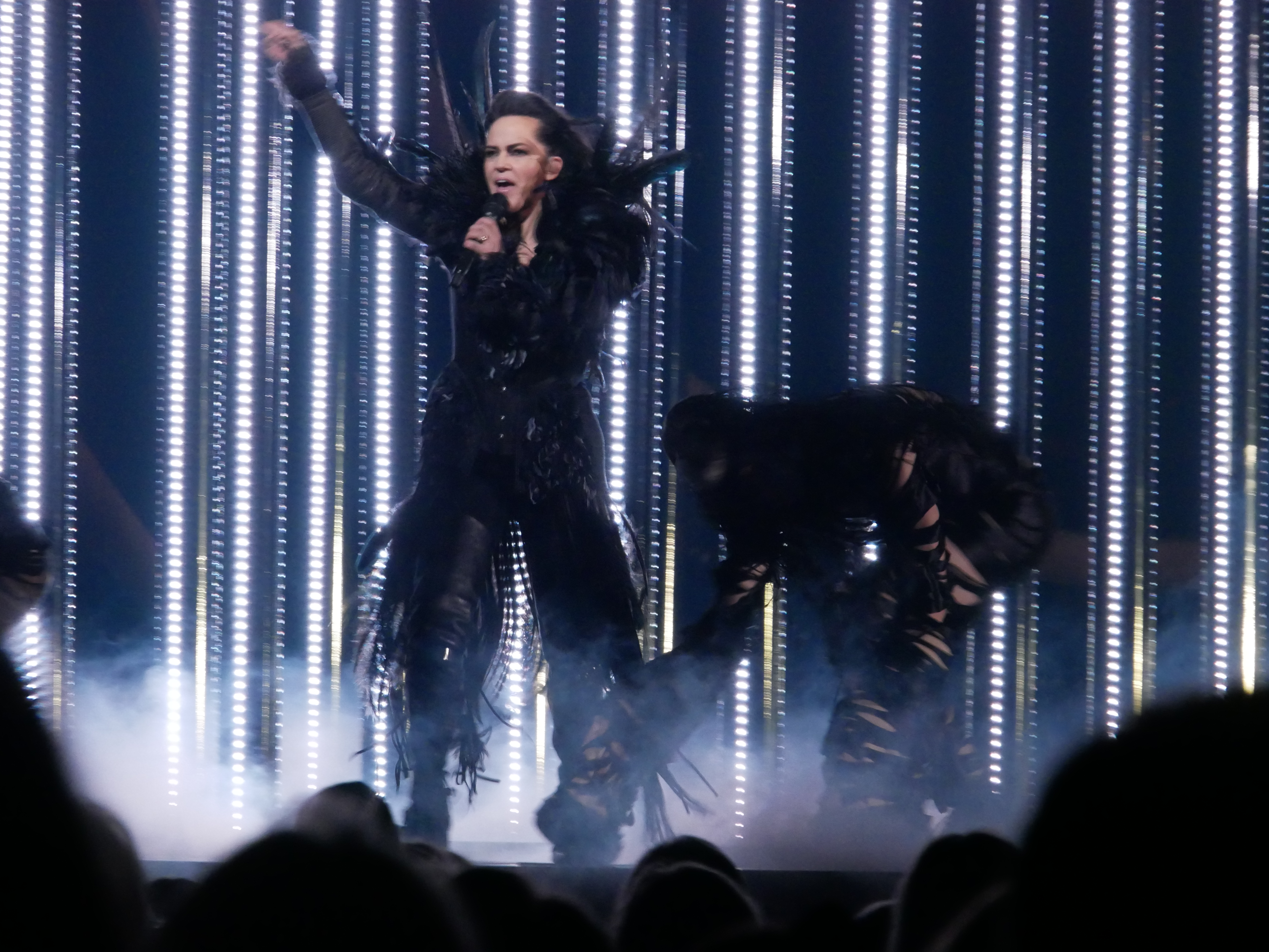 Melodifestivalen 2019 i Lidköping